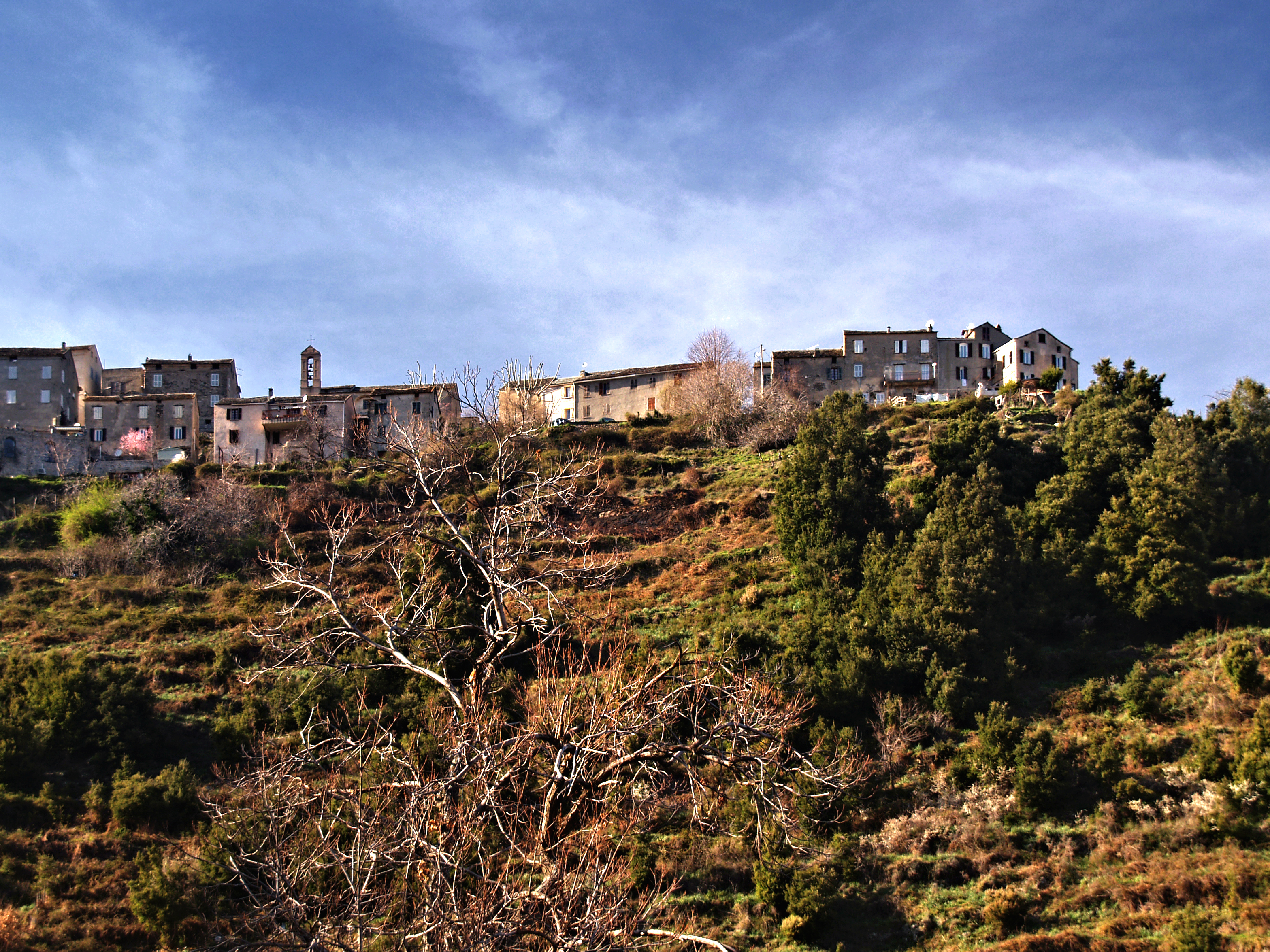 Quercitello (Corsica) - Vue du village depuis La Porta